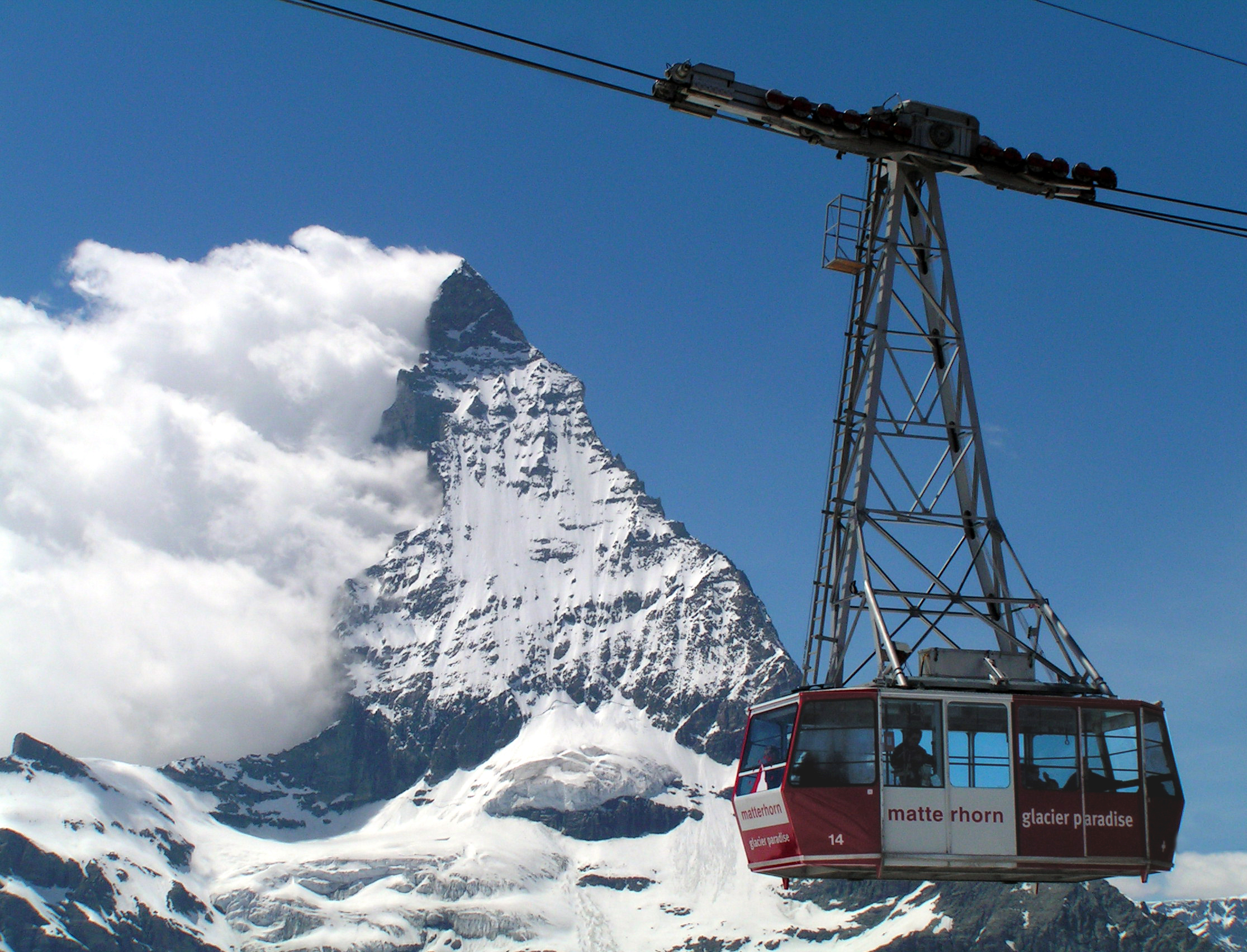 Wolkenbildung am Matterhorn mit Gondel